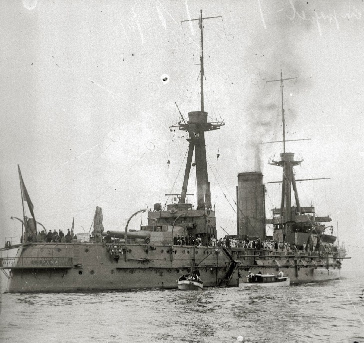 Le cuirassier España de l'Armada Espagnole, dans la baie de Pasajes de San Juan (Guipuzcoa), à destination de la guerre de l'Afrique en 1922.